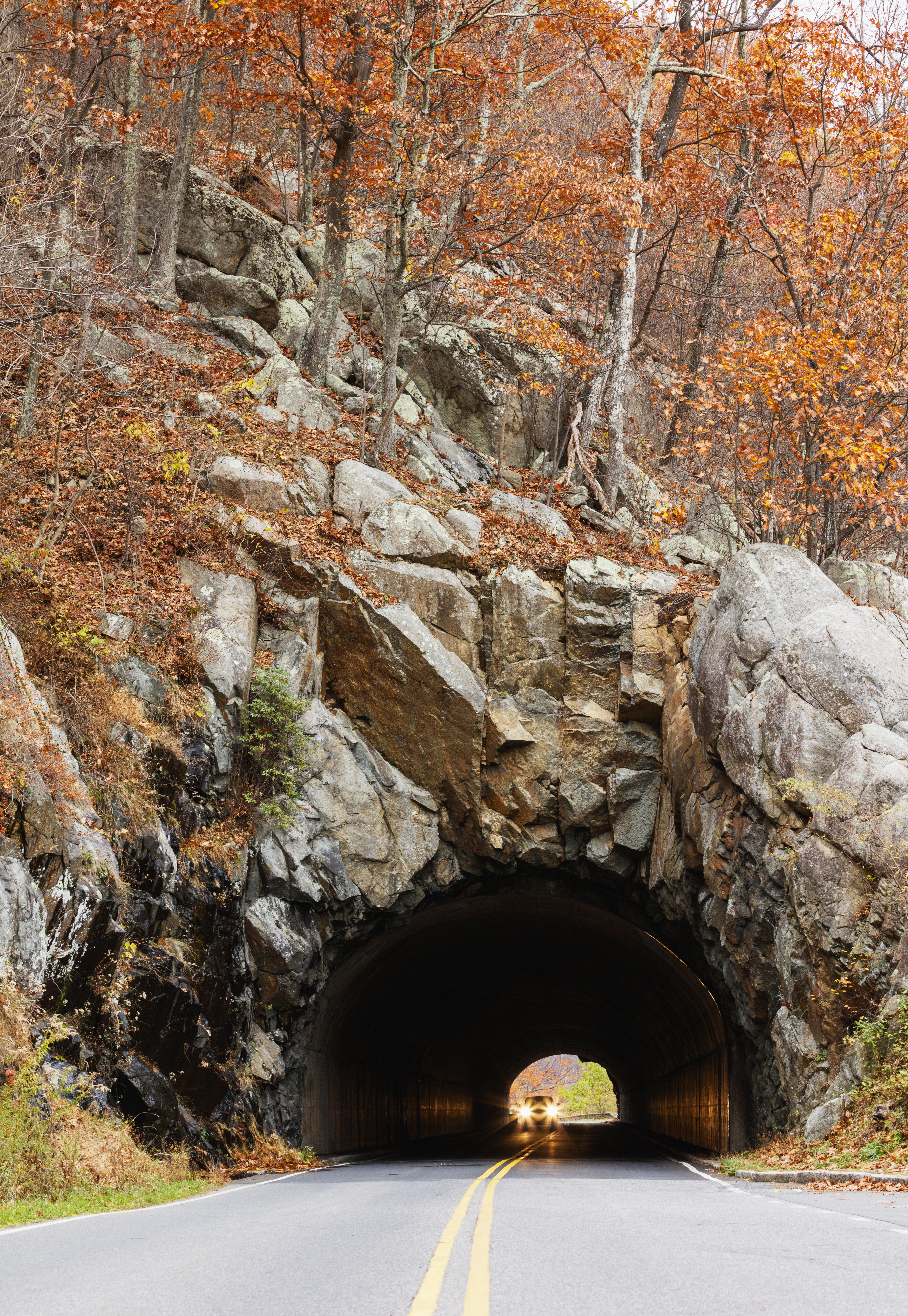 NPS | N. Lewis (KOA9622)